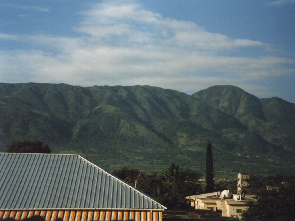 Cordillera Central, Jarabacoa, Dominican Republic